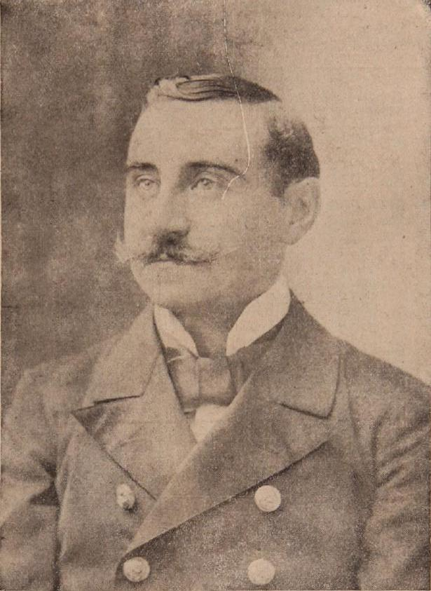 Arturo Whiteside Toro Capitán de Navío chileno (1869-1905).